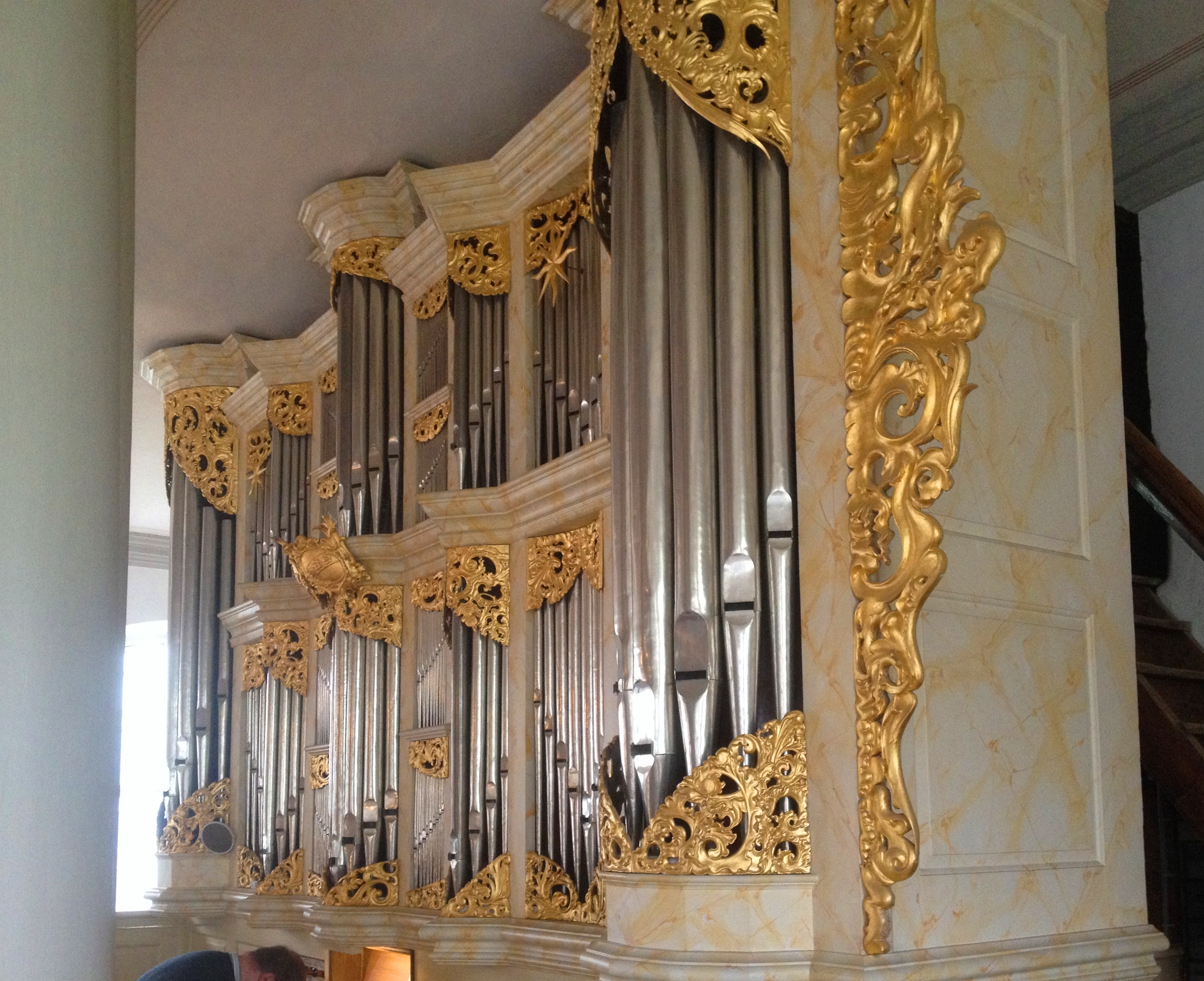 Liebenburg, Schlosskirche Mariä Verkündigung, Orgel